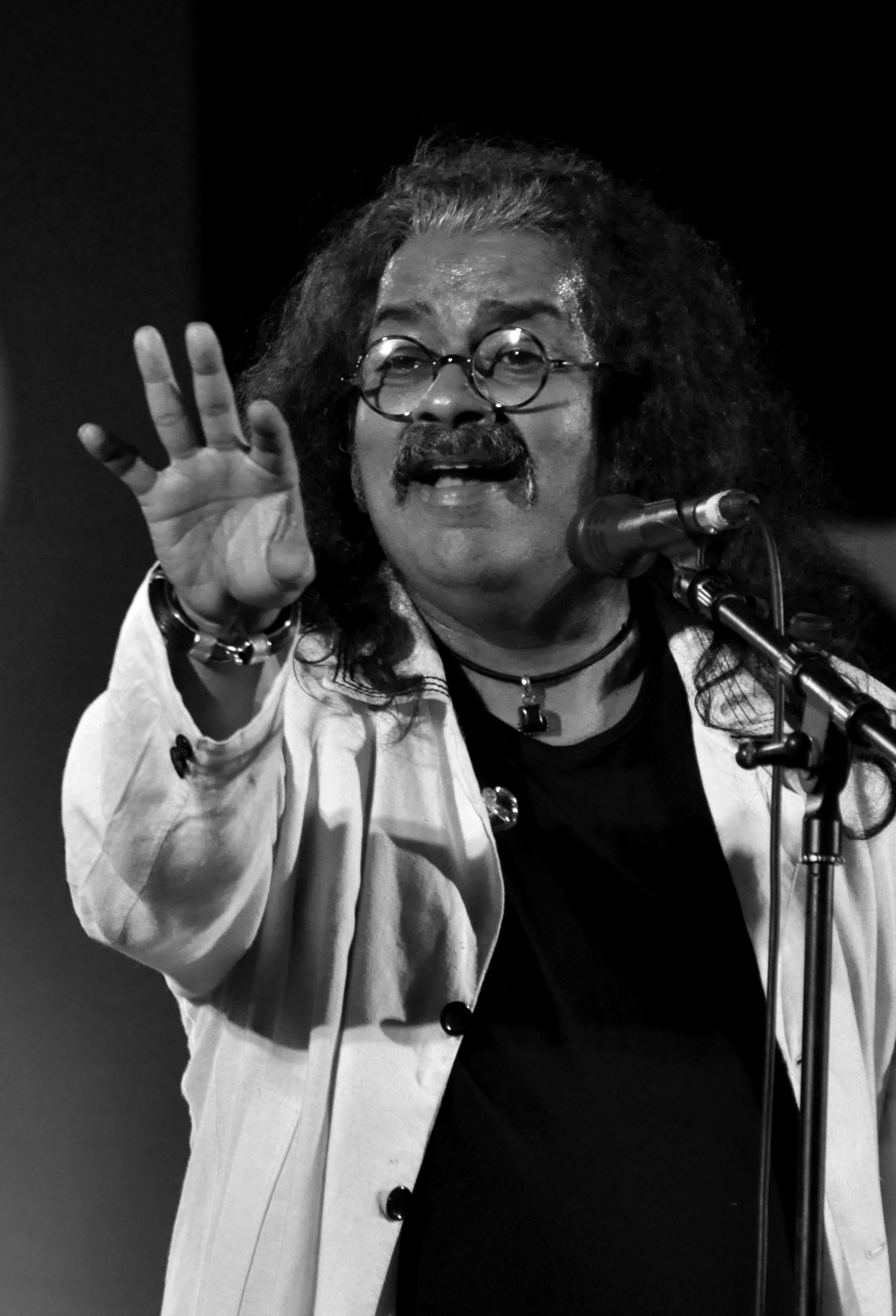 പ്രശസ്തനായ ഗസൽ ഗായകനും ചലച്ചിത്രപിന്നണിഗായകനുമാണ് എ. ഹരിഹരൻ. ഹിന്ദി, തമിഴ് തെലുങ്ക്, കന്നട, മലയാളം തുടങ്ങിയ ഭാഷകളിൽ‌ പാടിവരുന്നു. ഗസൽ‌ ആലാപന‌രംഗത്ത് തനതായ വ്യക്തിമുദ്ര പതിപ്പിച്ച ഇദ്ദേഹം ഫ്യൂഷൻ‌ മ്യൂസിക്കിന്റെ അറിയപ്പെടുന്ന വക്താവുകൂടിയാണ്. 2004-ൽ‌ പത്മശ്രീ നൽ‌കി ഭാരതസർക്കാർ ഇദ്ദേഹത്തെ ആദരിച്ചിട്ടുണ്ട്. നിരവധി ഗസൽ ആൽബങ്ങൾ,തമിഴ് ഹിന്ദി മലയാളം ചലച്ചിത്രങ്ങളിലൂടെ മികച്ച ഗാനങ്ങൾ, ലെസ്ലി ലൂയിസ് എന്ന ഗായകനുമായിച്ചേർന്ന് 'കൊളൊണിയൽ കസിൻസ്' എന്ന ഇന്ത്യൻ ഇംഗ്ലീഷ് ആൽബം എന്നിവ ഹരിഹരന്റേതായുണ്ട്.